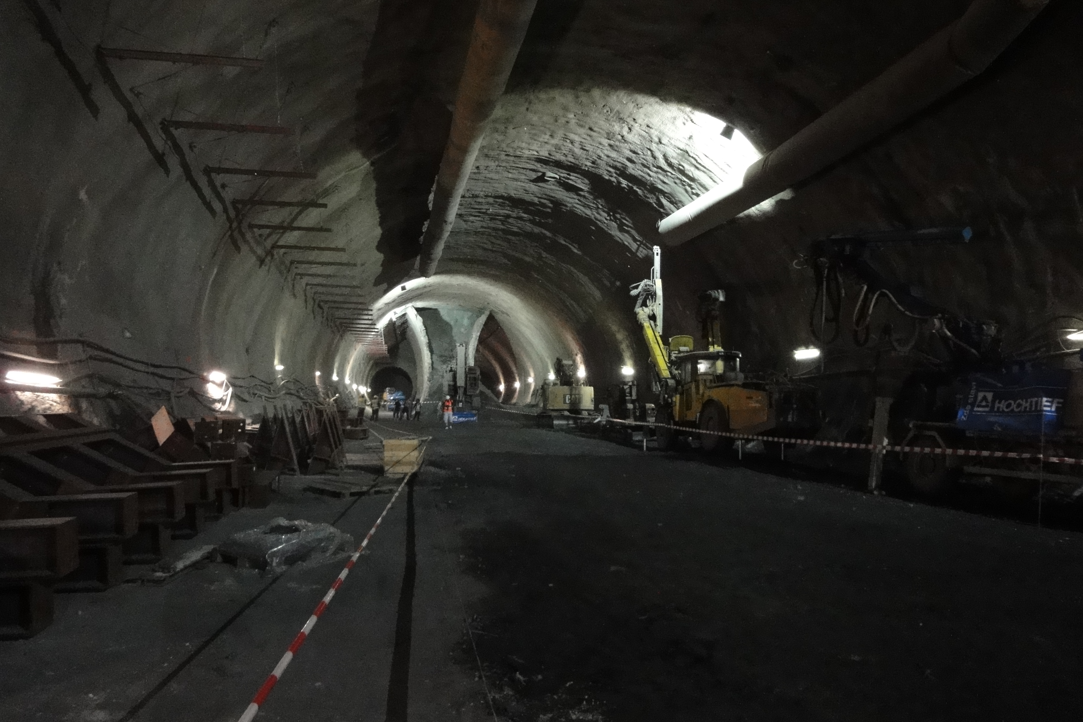 Stanice metra Bořislavka (dříve pracovně Červený vrch) na budovaném prodloužení trasy metra A (květen 2012).